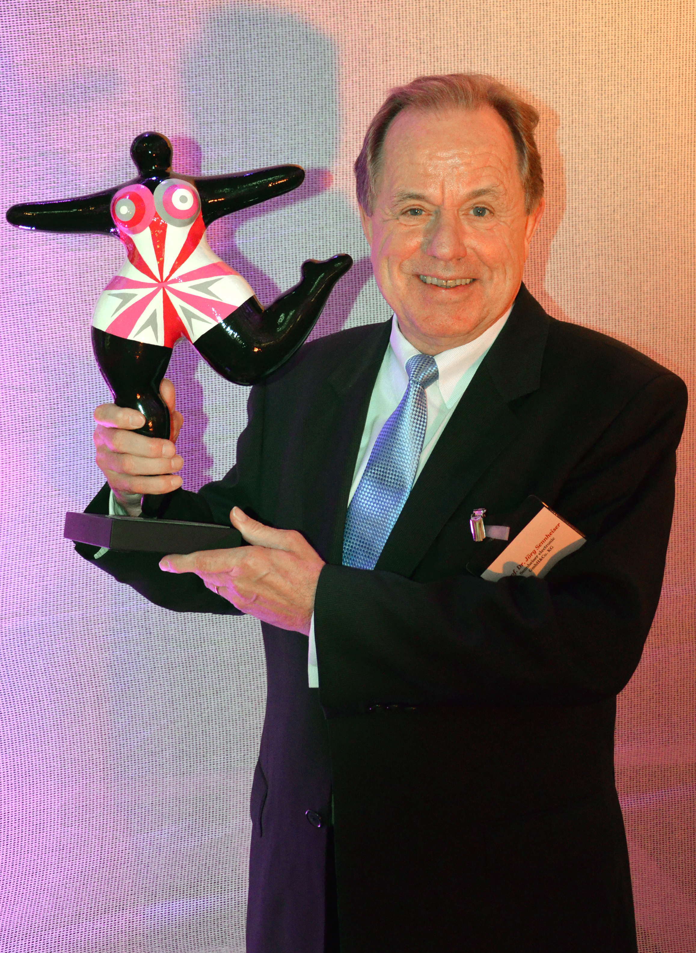 Jörg Sennheiser mit dem Preis als Unternehmer des Jahres 2014, hier kurz nach der Preisverleihung im Lichthof der Leibniz Universität Hannover ...